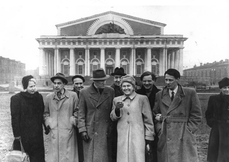 Delegation deutscher Kulturschaffender in der UdSSR Auf Einladung des sowjetischen Schriftstellerverbandes weilte im April 1948 eine Delegation fortschrittlicher deutscher Kulturschaffender in der UdSSR. Während ihres Aufenthaltes dort besucht die Delegation u.a. auch Leningrad. Die Delegation auf dem Isaak-Platz in Leningrad (v.l.): Ellen Kellermann, unbekannt, der Schriftsteller Eduard Claudius, der Filmautor Michael Tschesno-Hell, Jürgen Kuczynski, die Schriftstellerin Anna Seghers, der Philosoph Wolfgang Harich, der Lyriker und Essayist Stephan Hermlin. Abgebildete Personen: Seghers, Anna: Schriftstellerin, Präsidentin des Schriftstellerverbandes, DDR (GND 118612743) Claudius, Eduard: Botschafter in der DR Vietnam, Vizepräsident Akademie der Künste (AdK), Schriftsteller, DDR Tschesno-Hell, Michael: Schriftsteller, Drehbuchautor, DDR Harich, Wolfgang Dr.: Schriftsteller, Gesellschaftswissenschaftler, Universität Berlin, DDR Hermlin, Stephan: Vizepräsident des Internationalen PEN-Clubs, Schriftsteller, DDR (GND 118549812) Kuczynski, Jürgen Prof. Dr.: Volkswirtschaftler, Wirtschaftshistoriker, Mitglied der Akademie der Wissenschaften (AdW), DDR (GND 118567462)